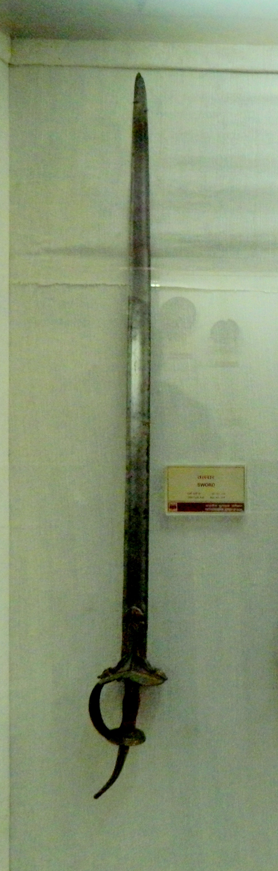 Меч фиранги в музее Красный форт